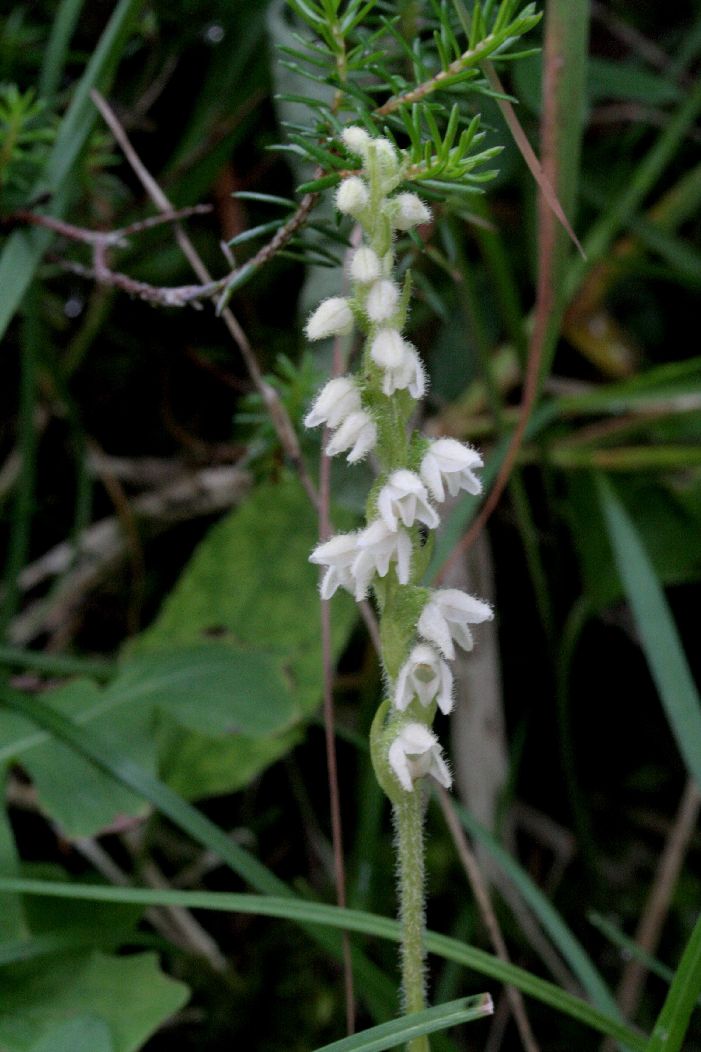 Godiera - Località: Cortina (BL), 1400 m s.l.m.